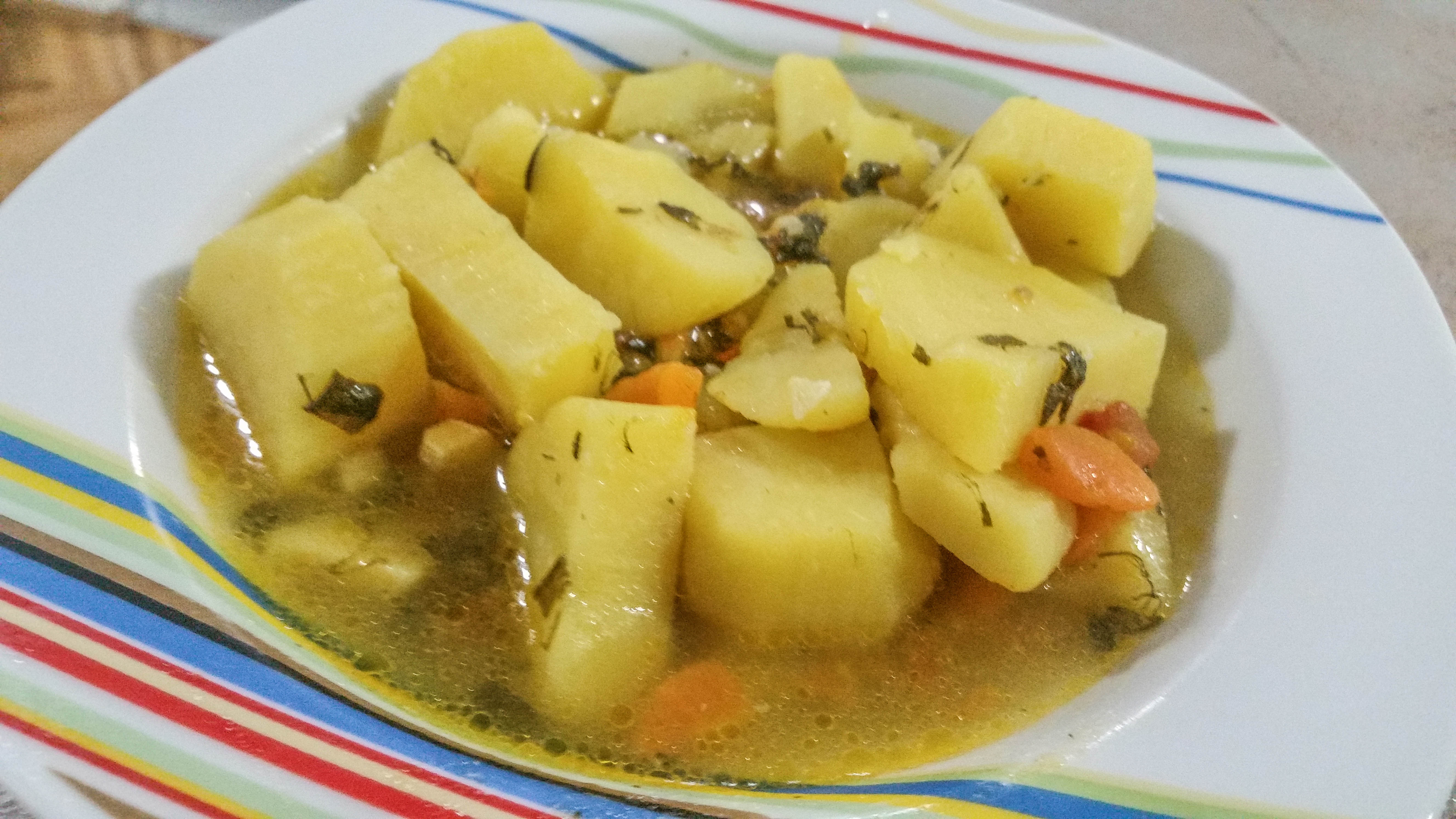 Јанија